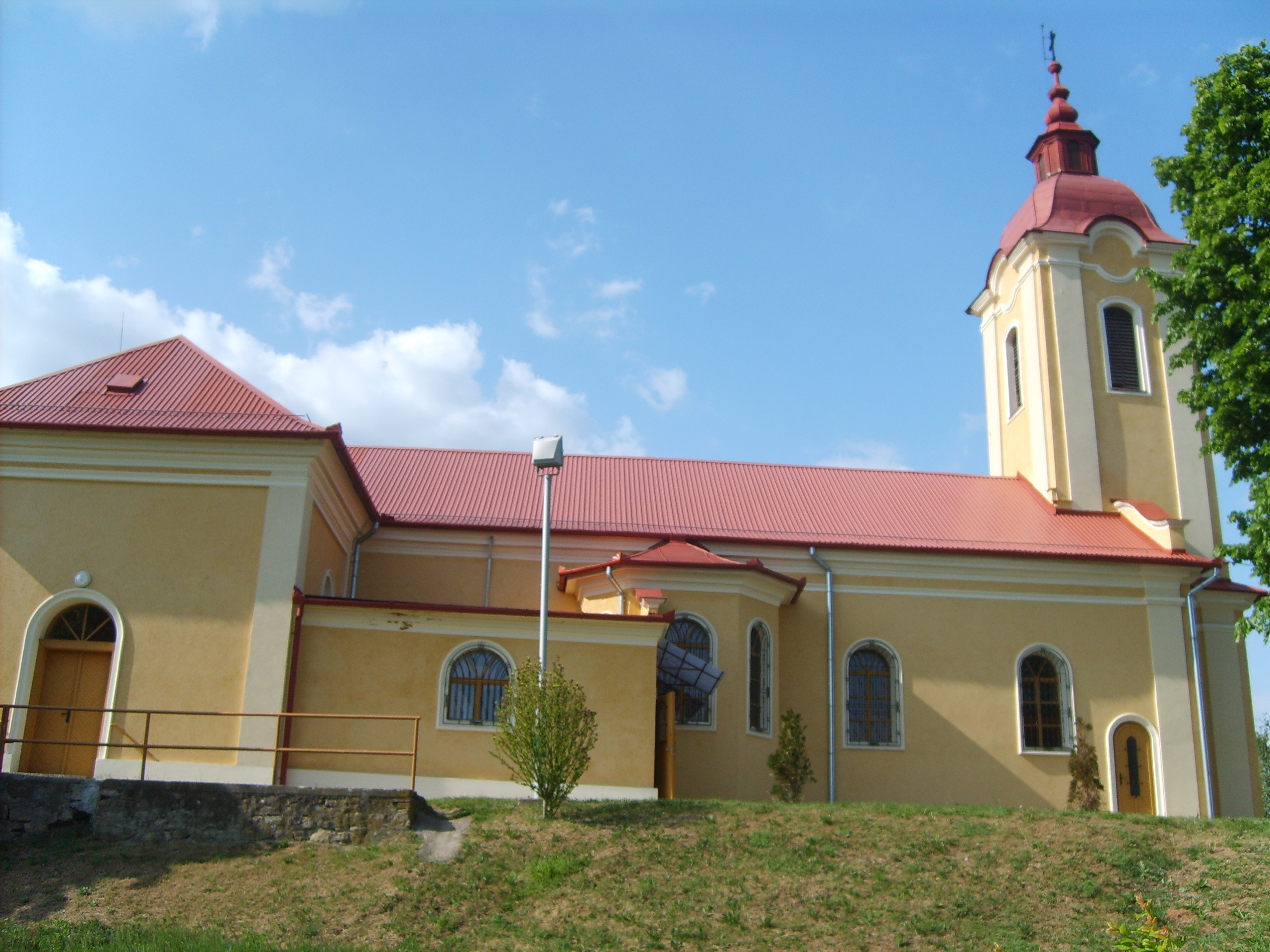 Hangonyi Szent Anna római katolikus templom oldalnézetből